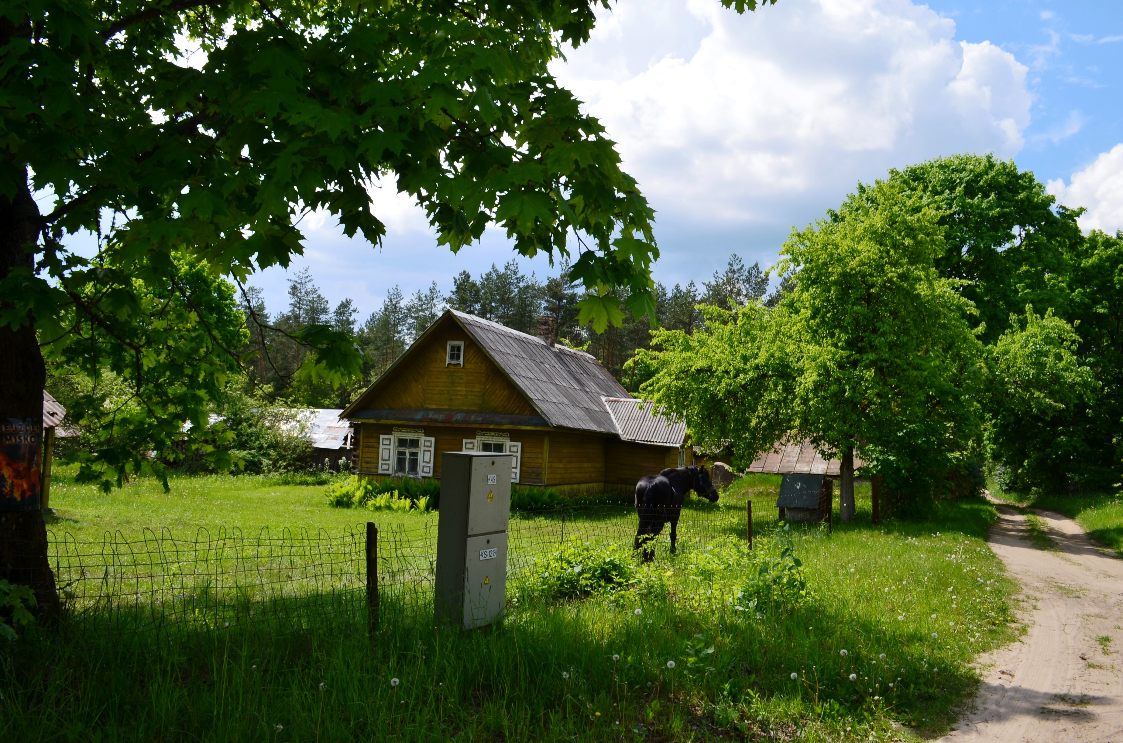 Giruliai, Vilniaus raj.